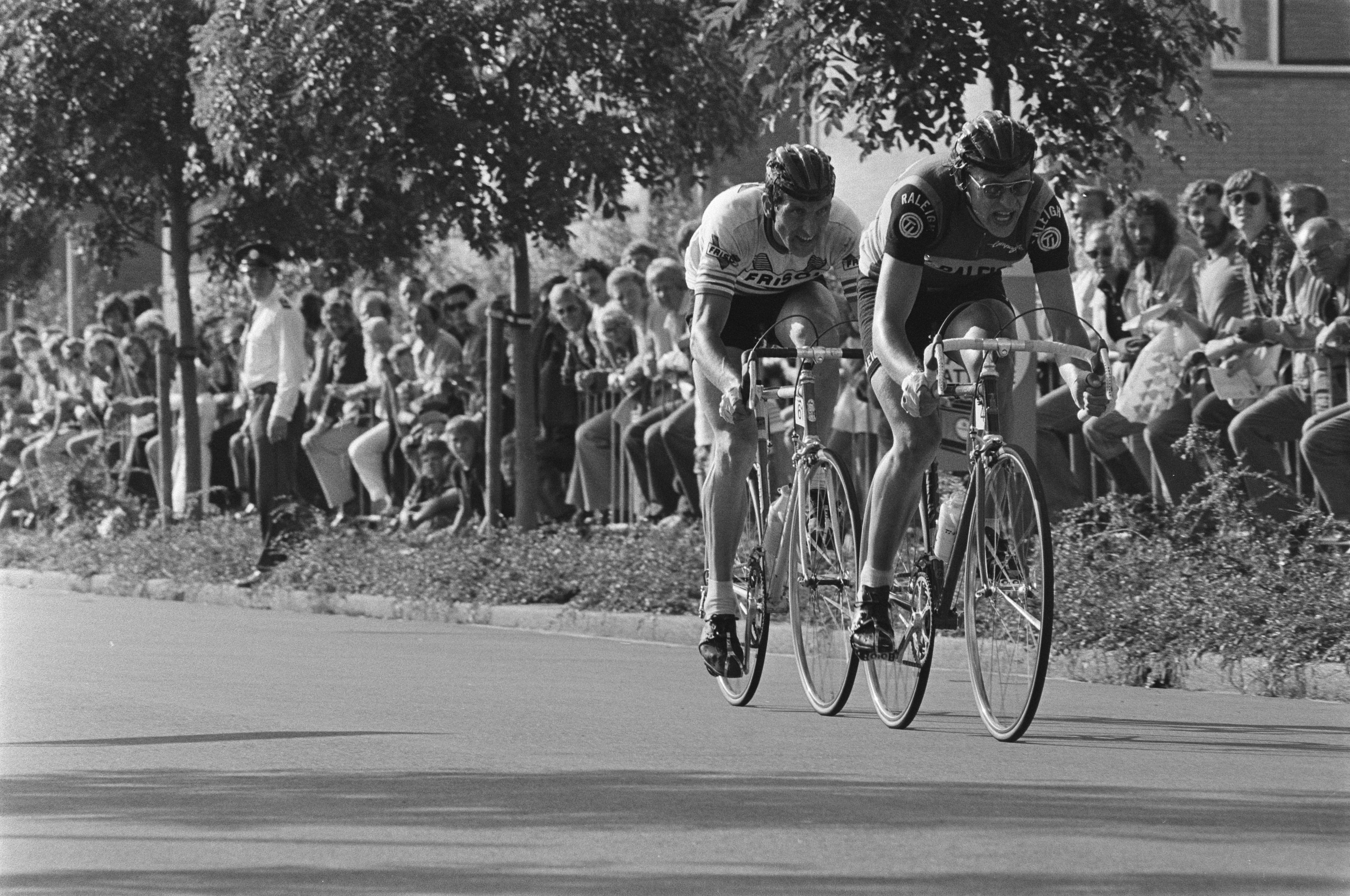 Eenentwintigste Ronde van Kortenhoef , Gerrie Knetemann (rechts) en Fedor den Hertog